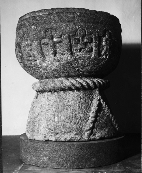 Dopfunt av sten. övermålad med grå oljefärg. Från 1100-talets slut. Efter behandling. Kategori: (04) DopfuntarDopfunt av sten. övermålad med grå oljefärg. Från 1100-talets slut. Efter behandling.